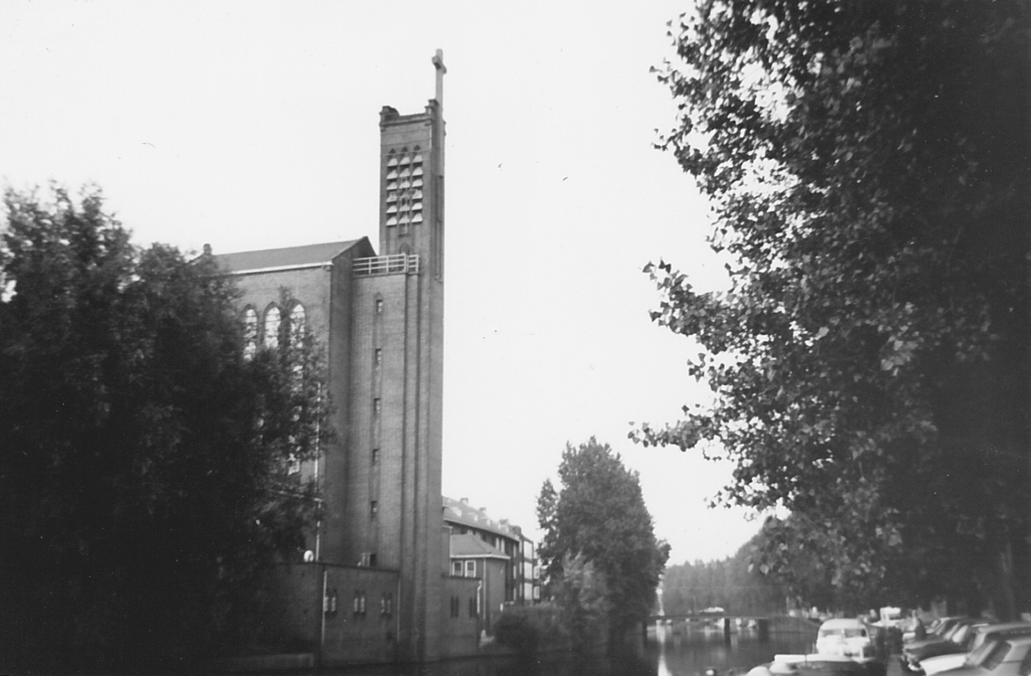 Rooms-katholieke Sint Augustinuskerk (De Star), Postjesweg 125, Amsterdam, net voor de afbraak.